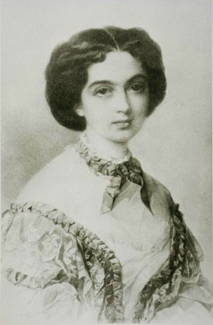 Графиня Елена Карловна Пален, ур. Толь (1833—1910)